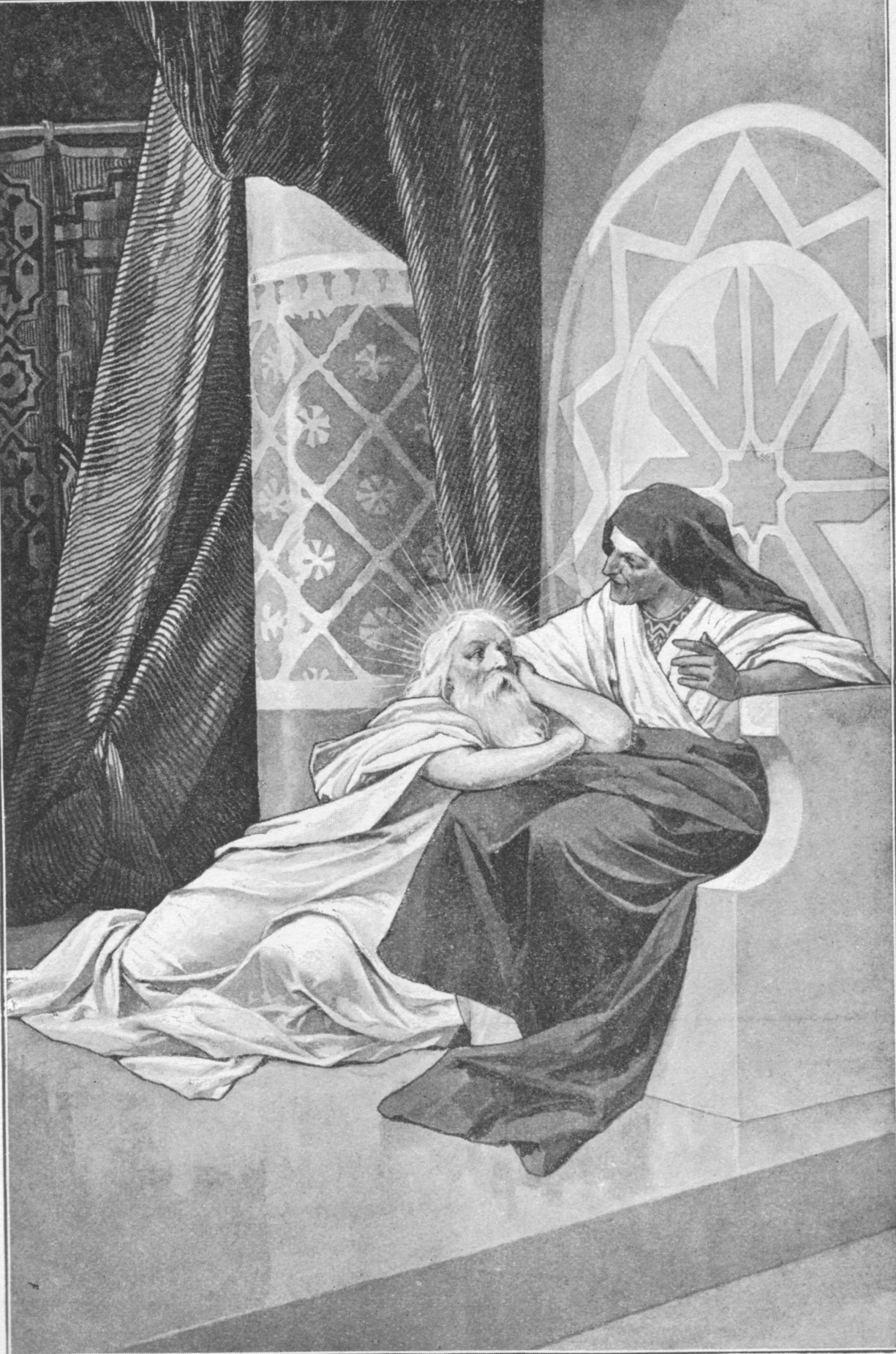 Ilustrace Věnceslava Černého (1865-1936) k pohádce Tři zlaté vlasy děda Vševěda z knihy K. J. Erbena (1811-1870) Báje a pověsti slovanské. Kniha bez vročení, ale předslov napsán v roce 1901 (jediné uvedené datum v knize). Dle katalogu nkp.cz vydáno v roce 1902.